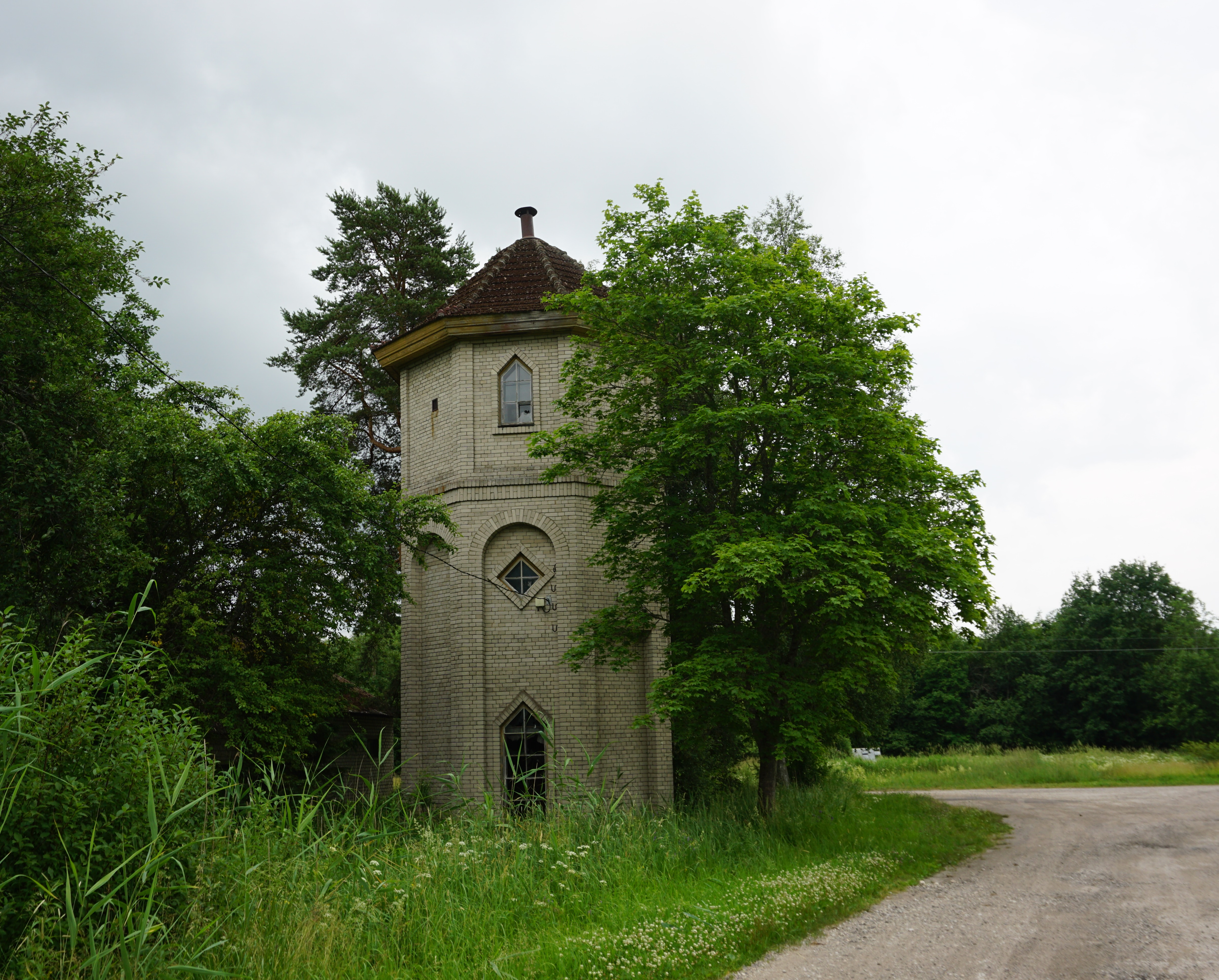 Lihula jaama veetorn endisel Rapla-Virtsu kitsarööpmelisel raudteel. Valminud 1930. aastate alguses.